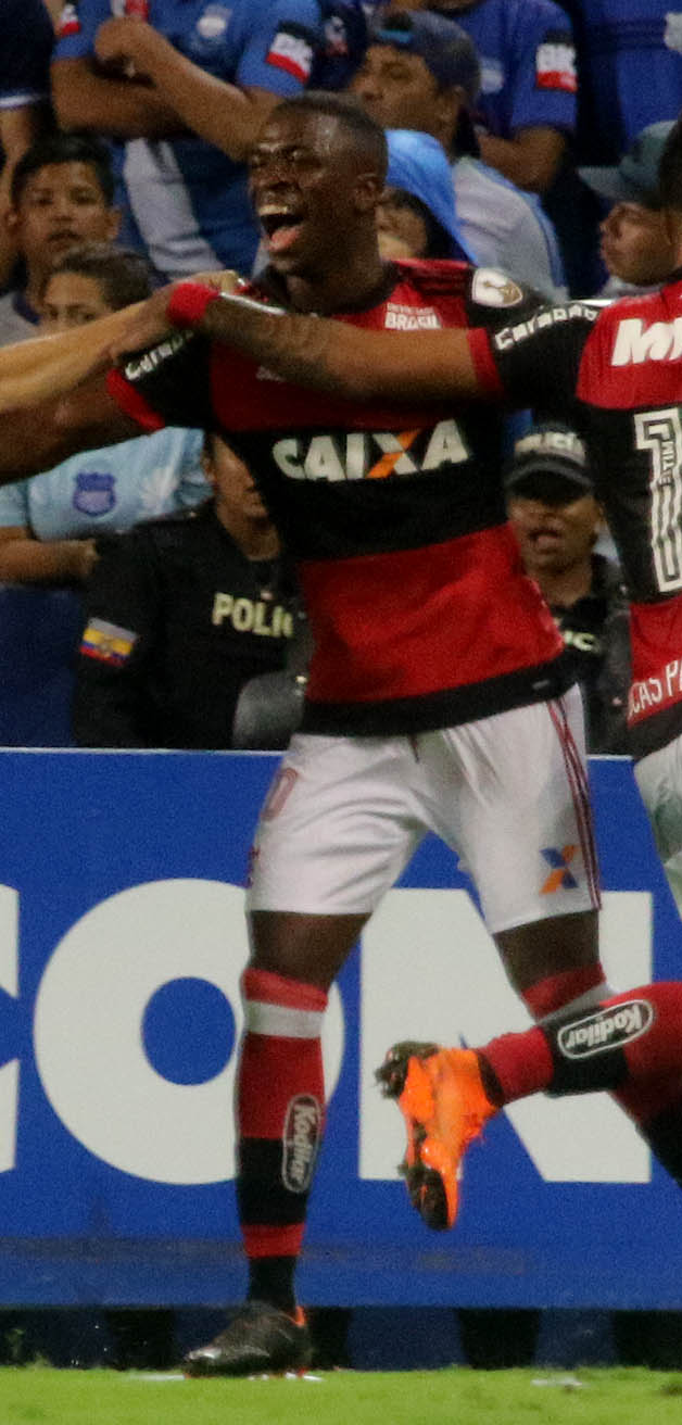 Guayaquil, miércoles 14 de marzo del 2018 (Andes).-En el estadio Capwell en Guayaquil, Emelec enfrenta a Flamengo de Brasil en la segunda fecha del grupo D de la Copa Libertadores. Foto:Andes/César Muñoz